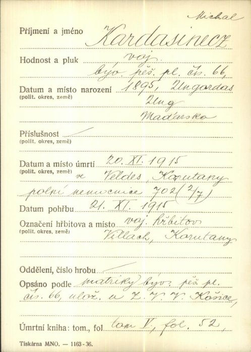 картка з війського архіву м. Прага Кардашинець Михайло. (Вовкове, Унгордаш)